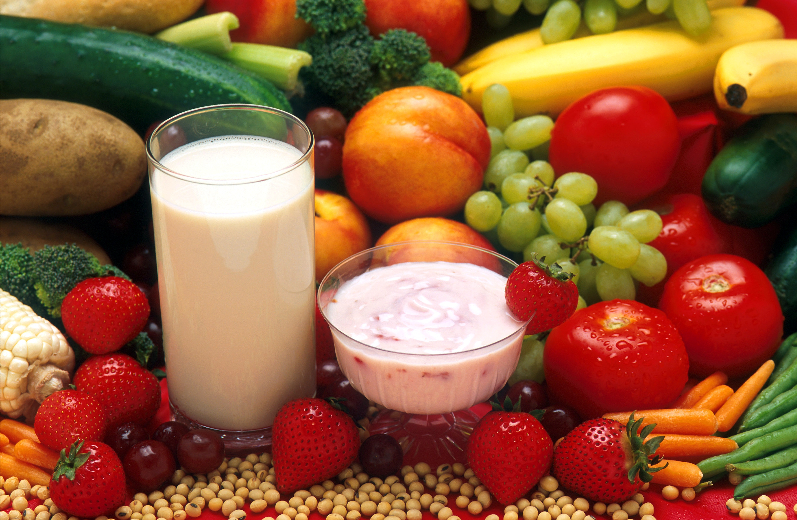 Agricultural Research Service, Photo by Peggy Greb., public domain